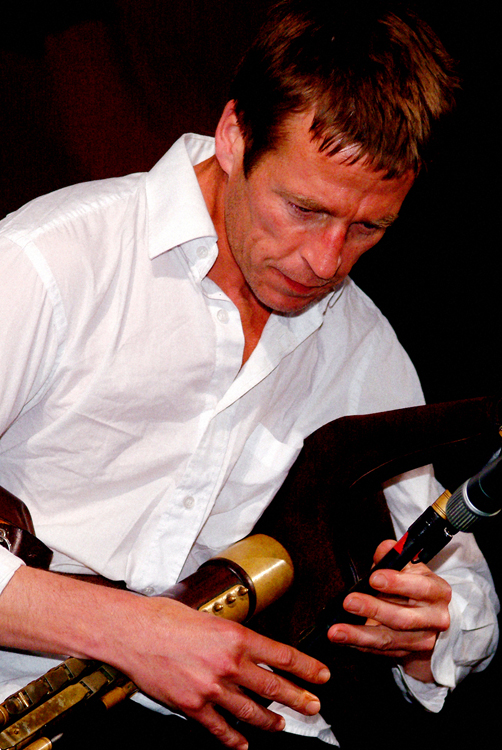 El músico Eoin Dillon, perteneciente al grupo irlandes KILA, durante la actuación en el festival SonCelta en la población de Porto do Son, Galicia - España.